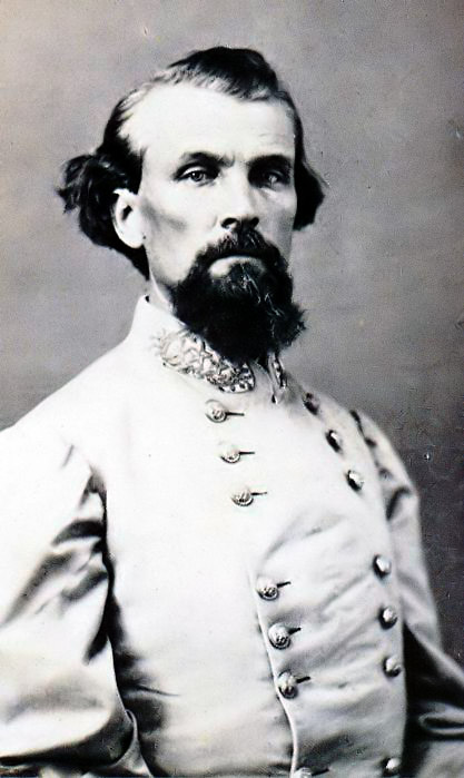 Nathan Bedford Forrest. Overleden in 1877.